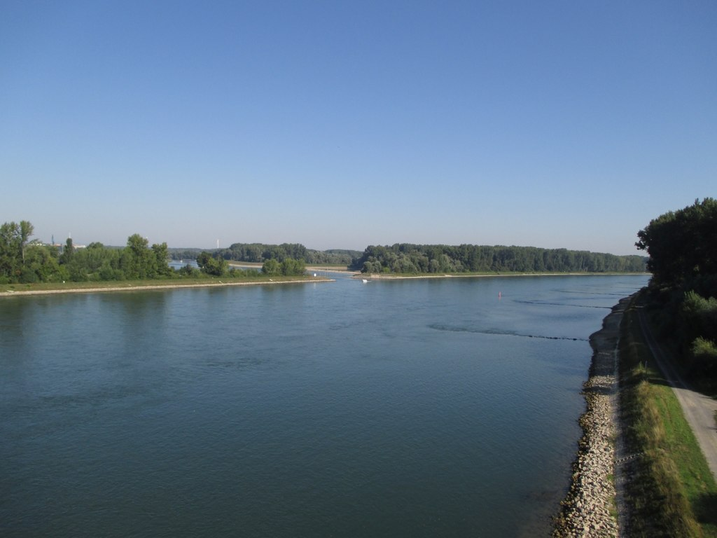 Germersheim: Blick über den Rhein mit der Hafeneinfahrt